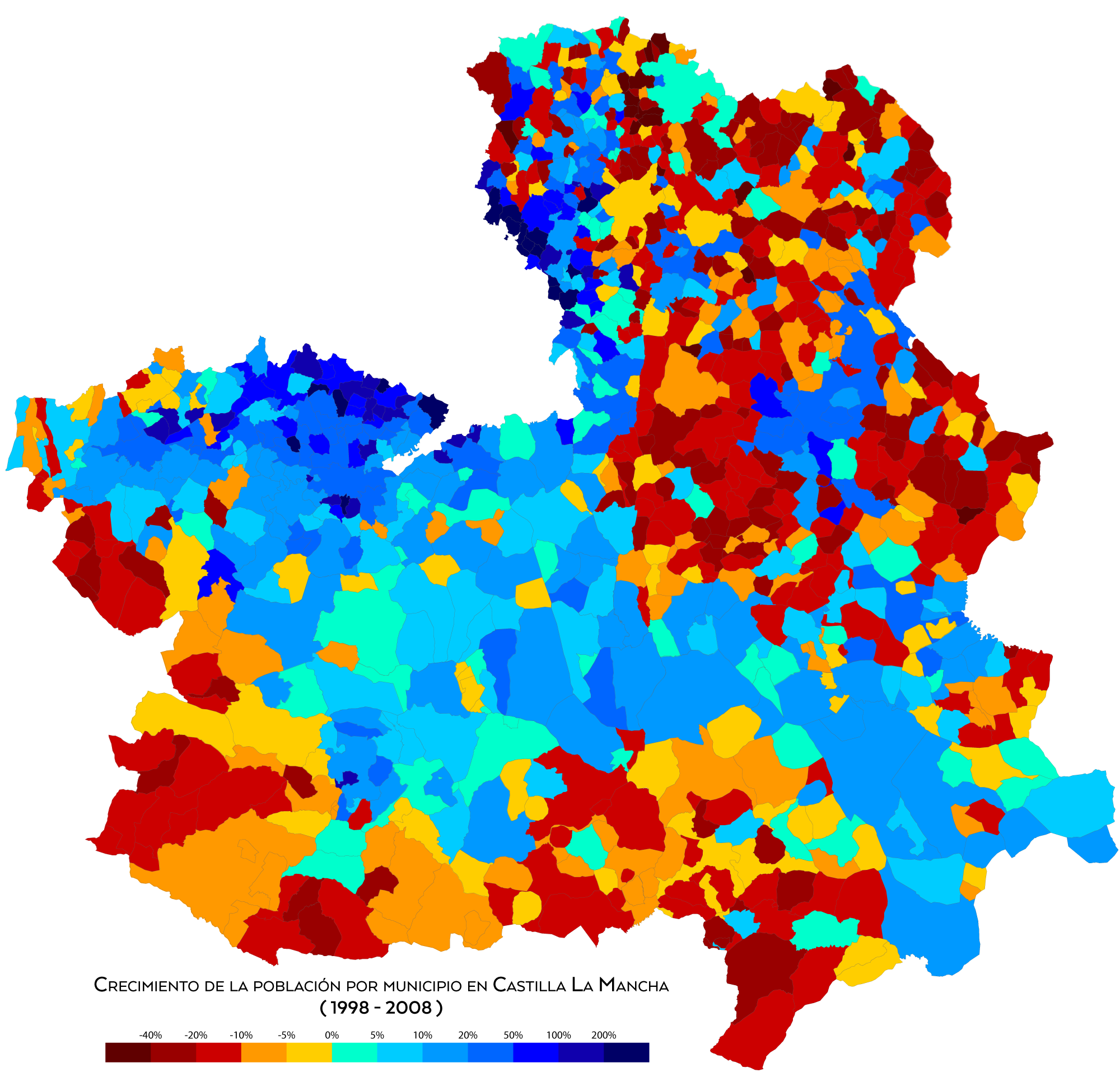 Crecimiento de la población por municipio en Castilla La Mancha entre 1998 y 2008.